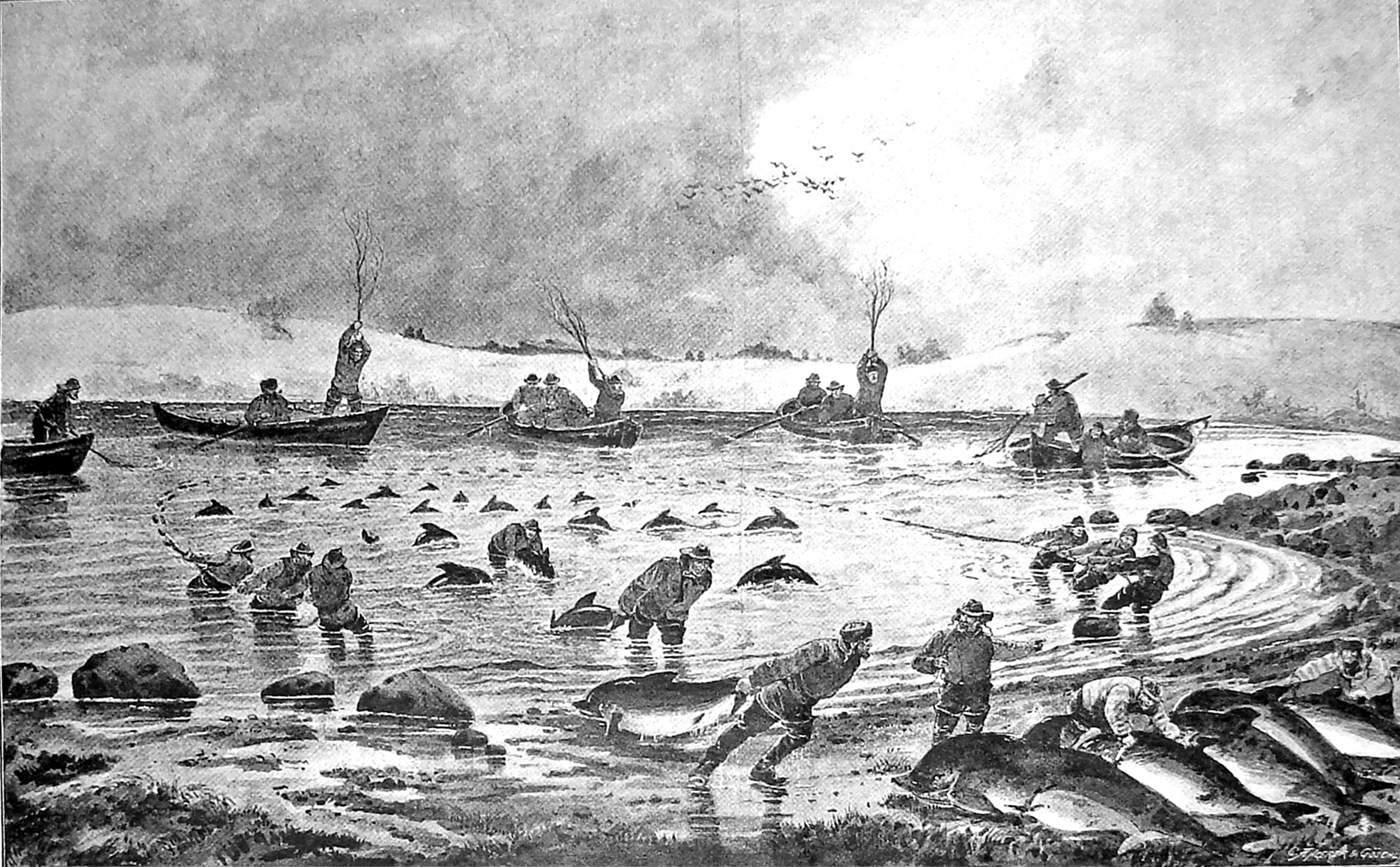 Marsvinefangst Gamborg Fjord